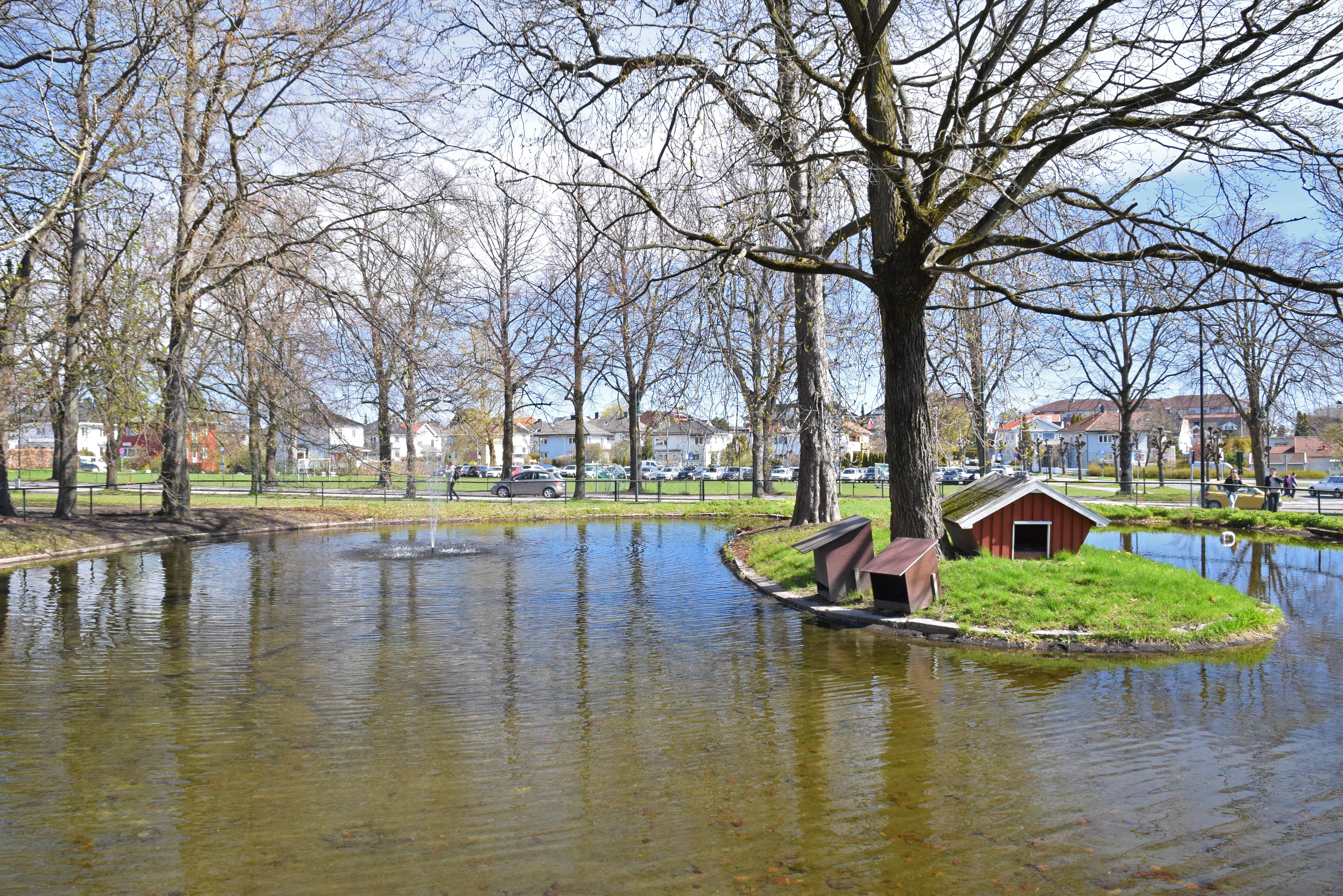 Dammen i Gunnarsbøparken, sett mot Stoltenbergs gate